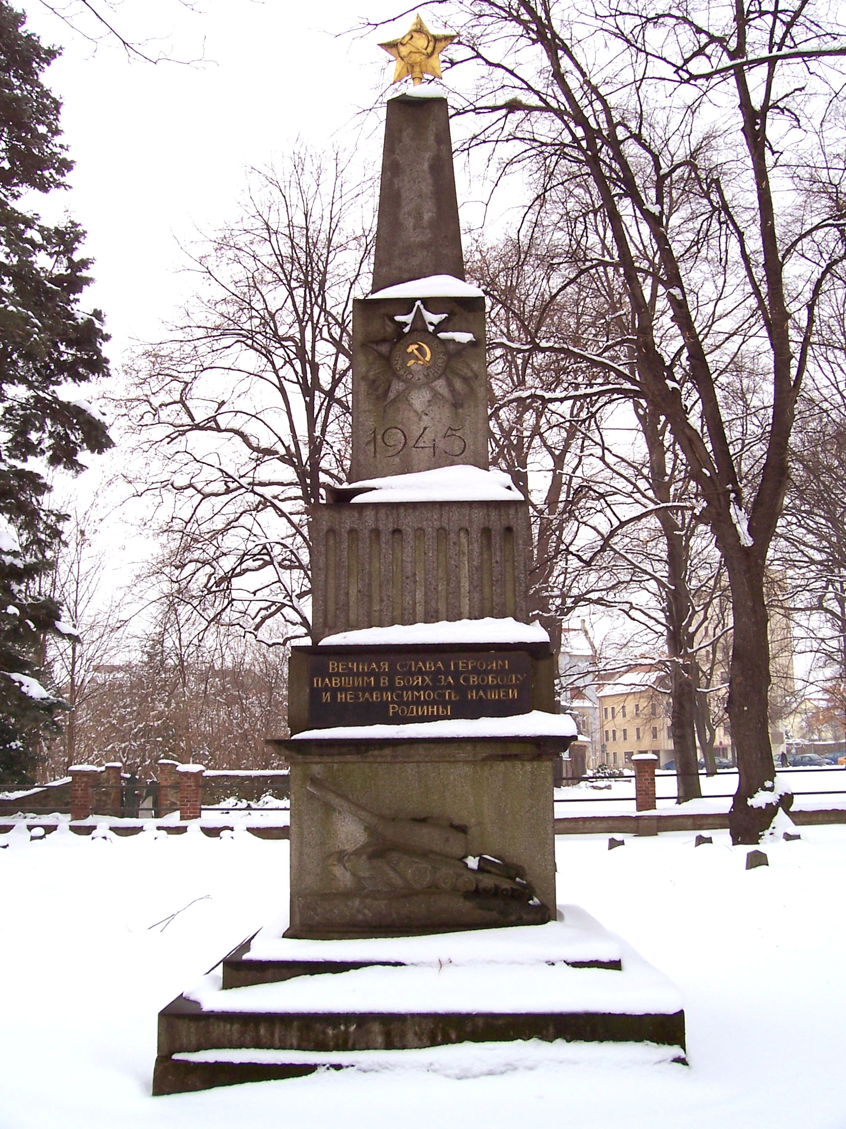 Mahnmal auf dem Russischen Soldatenfriedhof ("Russenfriedhof") in Bautzen